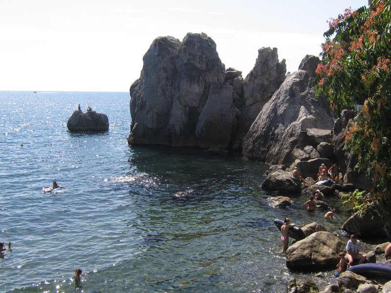 вид на море